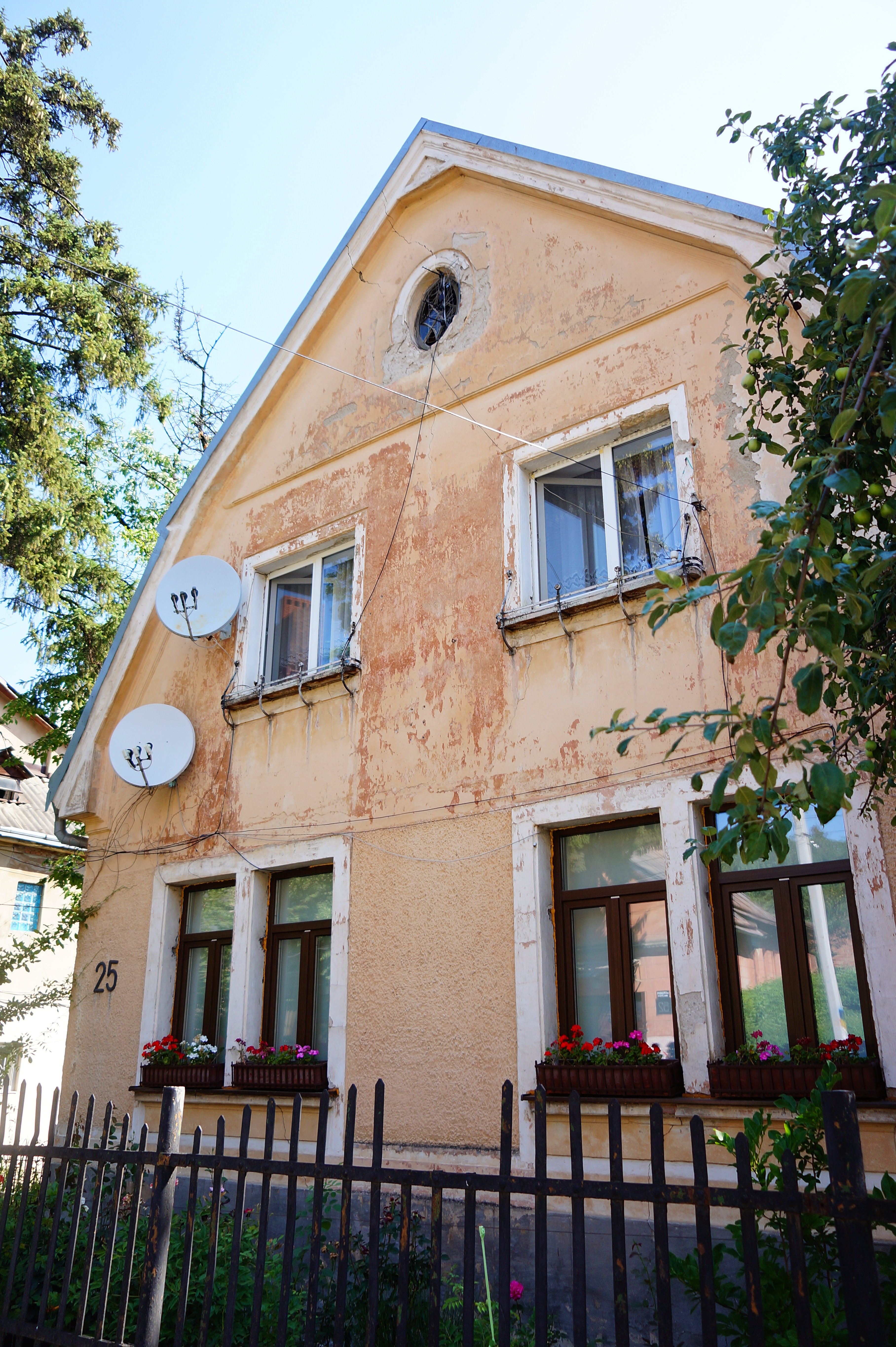 Будинок, в якому проживала родина Гузарів – громадсько – політичних діячів Буковини, Чернівці, вул. Федьковича, 25